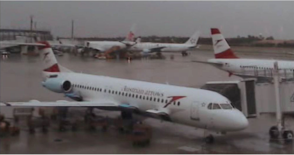 Fokker 100 der Austrian parkt bei Dock 42 des Flughafen Wien-Schwechat, daneben eine Austrian - Airbus A320, im Hintergrund eine China Airlines und eine Boeing 767 von Austrian (Star Alliance Livery). Juli 2007, schlechte Sichtverhältnisse und Regen. Leider unscharf geworden.